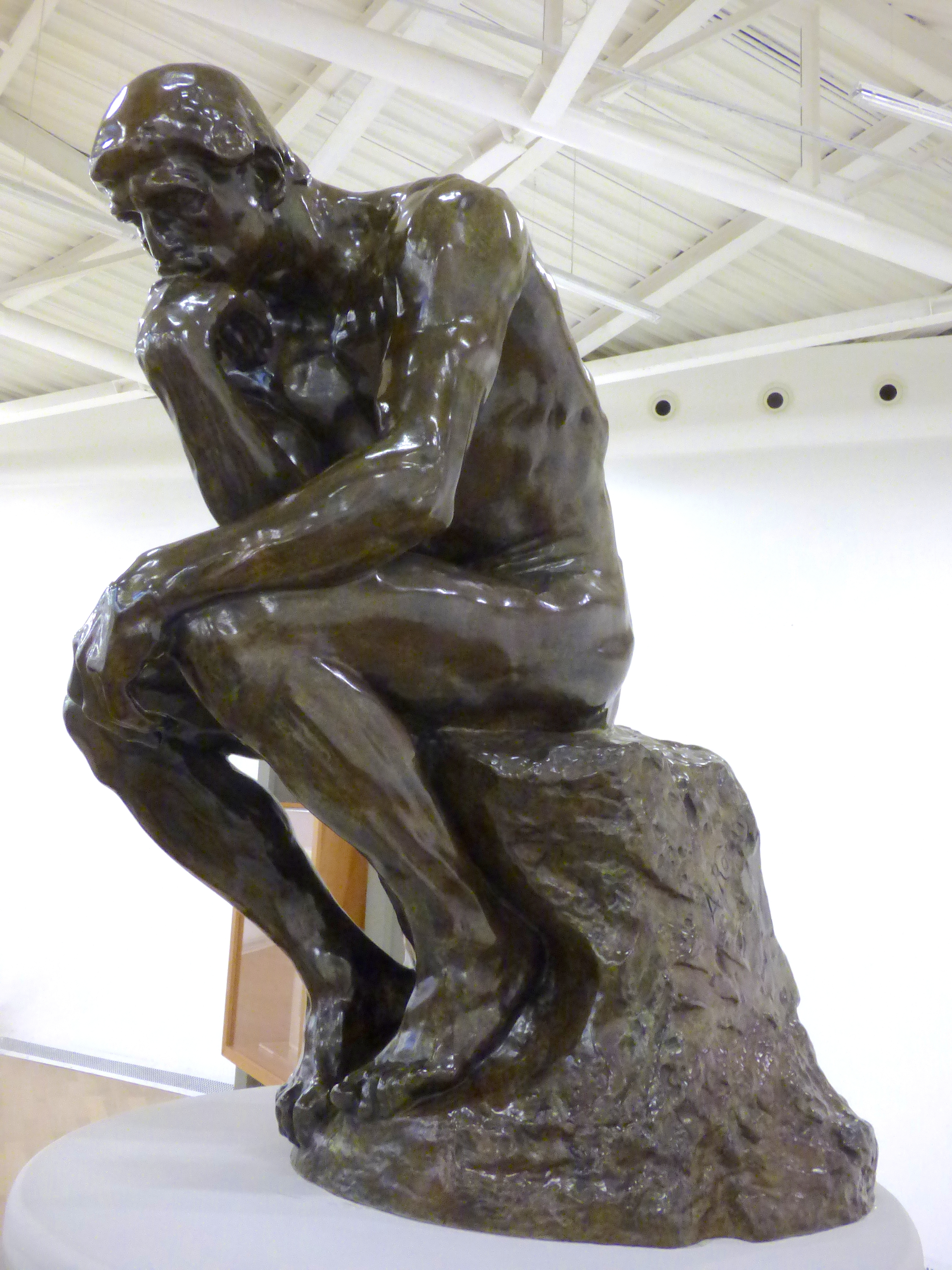 El Pensador (1903) de Auguste Rodin, en el Museo Soumaya, Mexico. De la edición limitada hecha por Fundidora Valsuani.